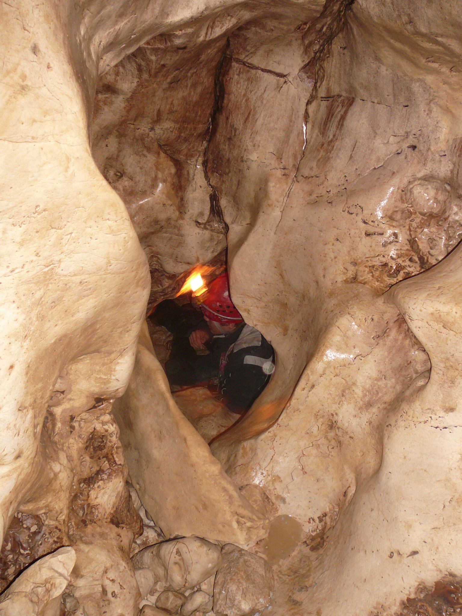 uno stretto passaggio, grotta calgeron